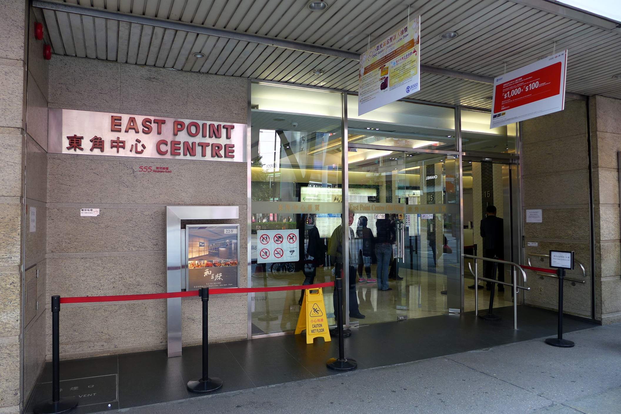 East Point Centre Entrance